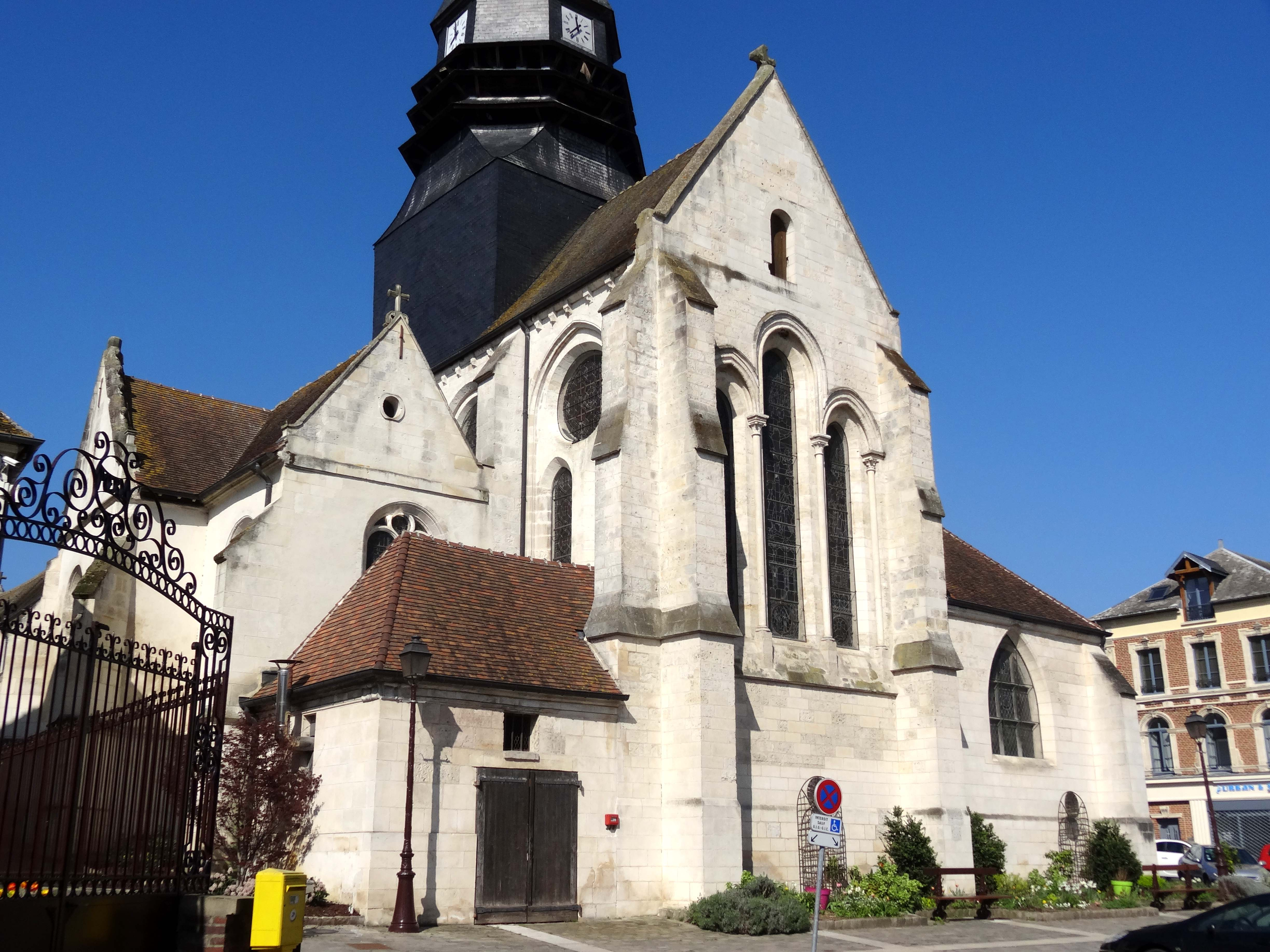 Église Saint-Lucien de Méru - voir titre.